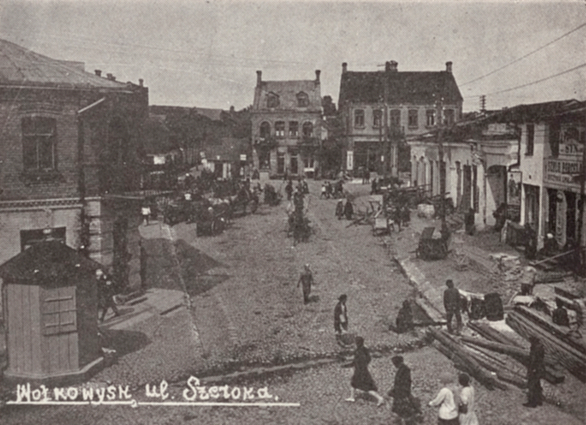 Беларуская (тарашкевіца): Ваўкавыск (Vaŭkavysk), пляц Рынак (plac Rynak) з боку вуліцы Шырокай (vulica Šyrokaja)